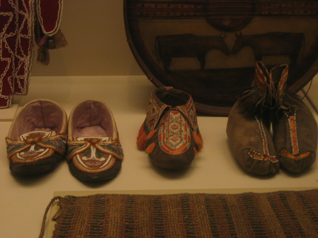 British Museum, London : chaussures et mocassins des Indiens du Nord-Est des USA